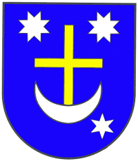 Історичний герб с, Китайгород (Царичанський район)